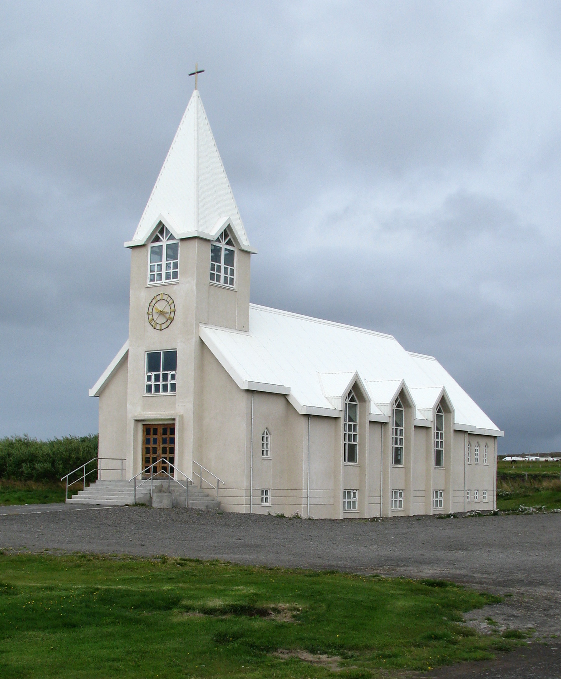 Kerk van Þórshöfn, IJsland